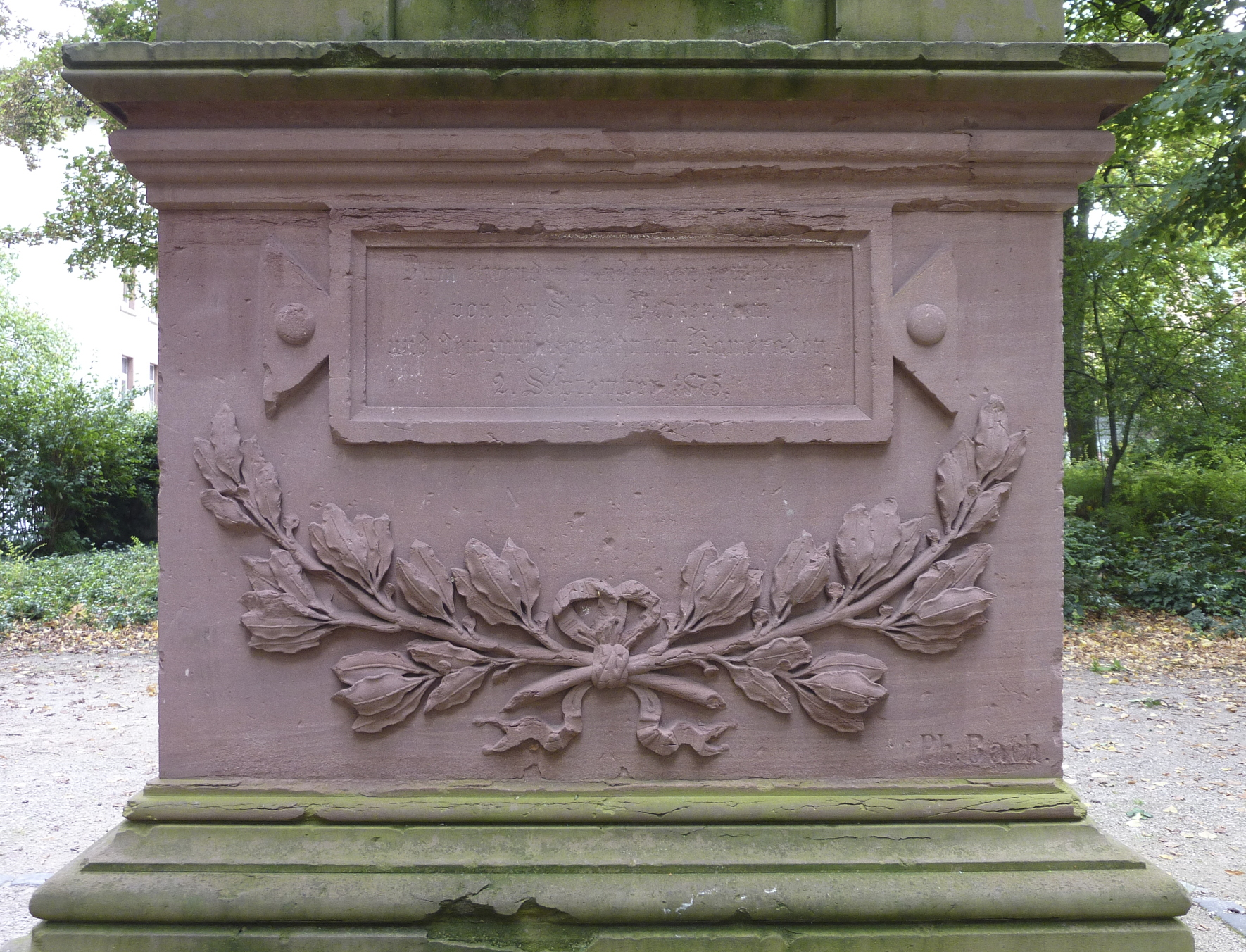 Frankfurt am Main, Stadtteil Bockenheim: Der Alte Friedhof Bockenheim ist ein von 1825 bis 1898 für Begräbnisse genutzter Friedhof, der im Jahr 1916 zu einer öffentlichen Grünanlage umgewidmet wurde. Das Foto zeigt eine Gedenktafel am Kriegerdenkmal aus dem Jahr 1875 im Park